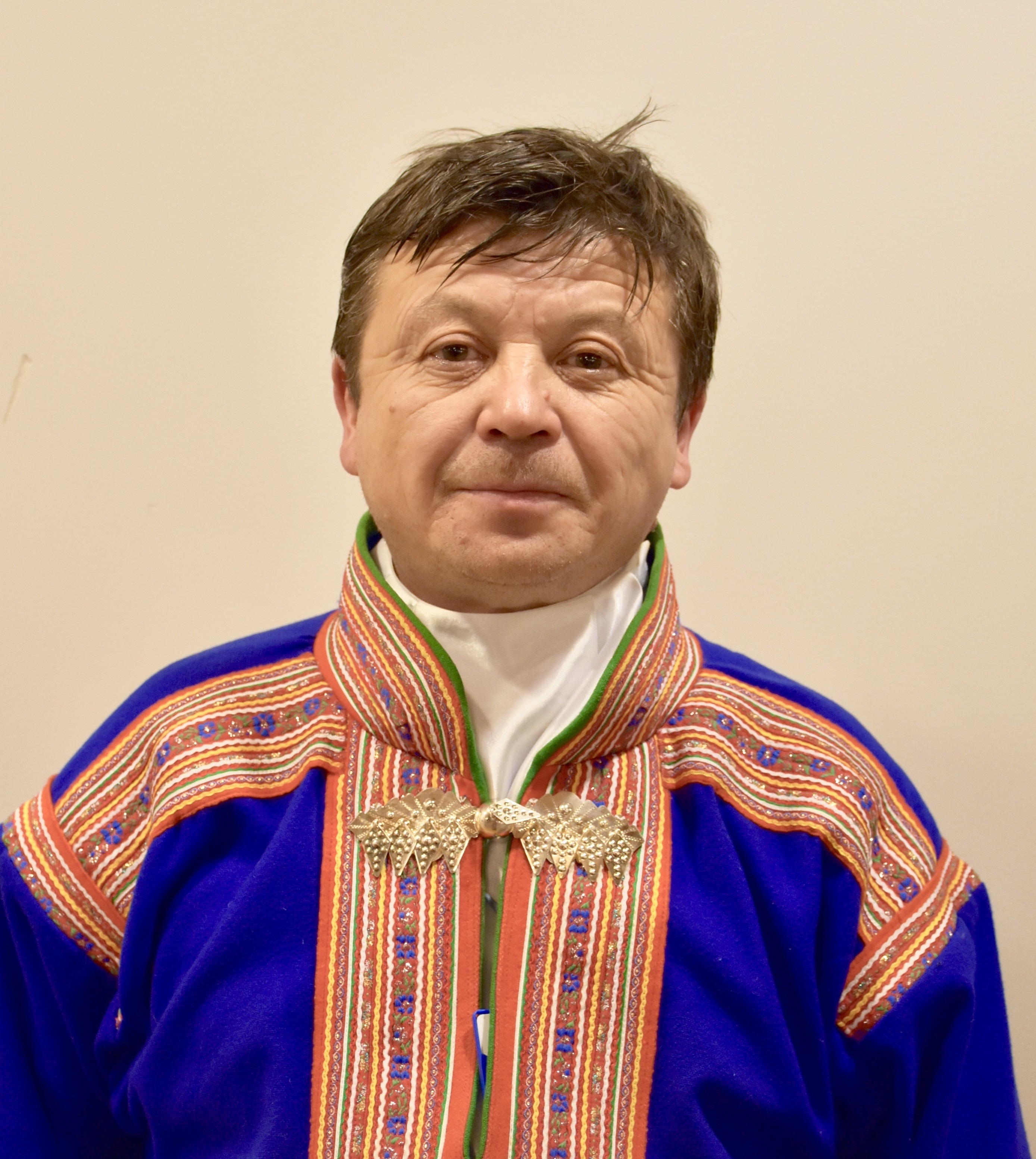 Nils M. Utsi (foto: Åse M. P. Pulk/Sámediggi)